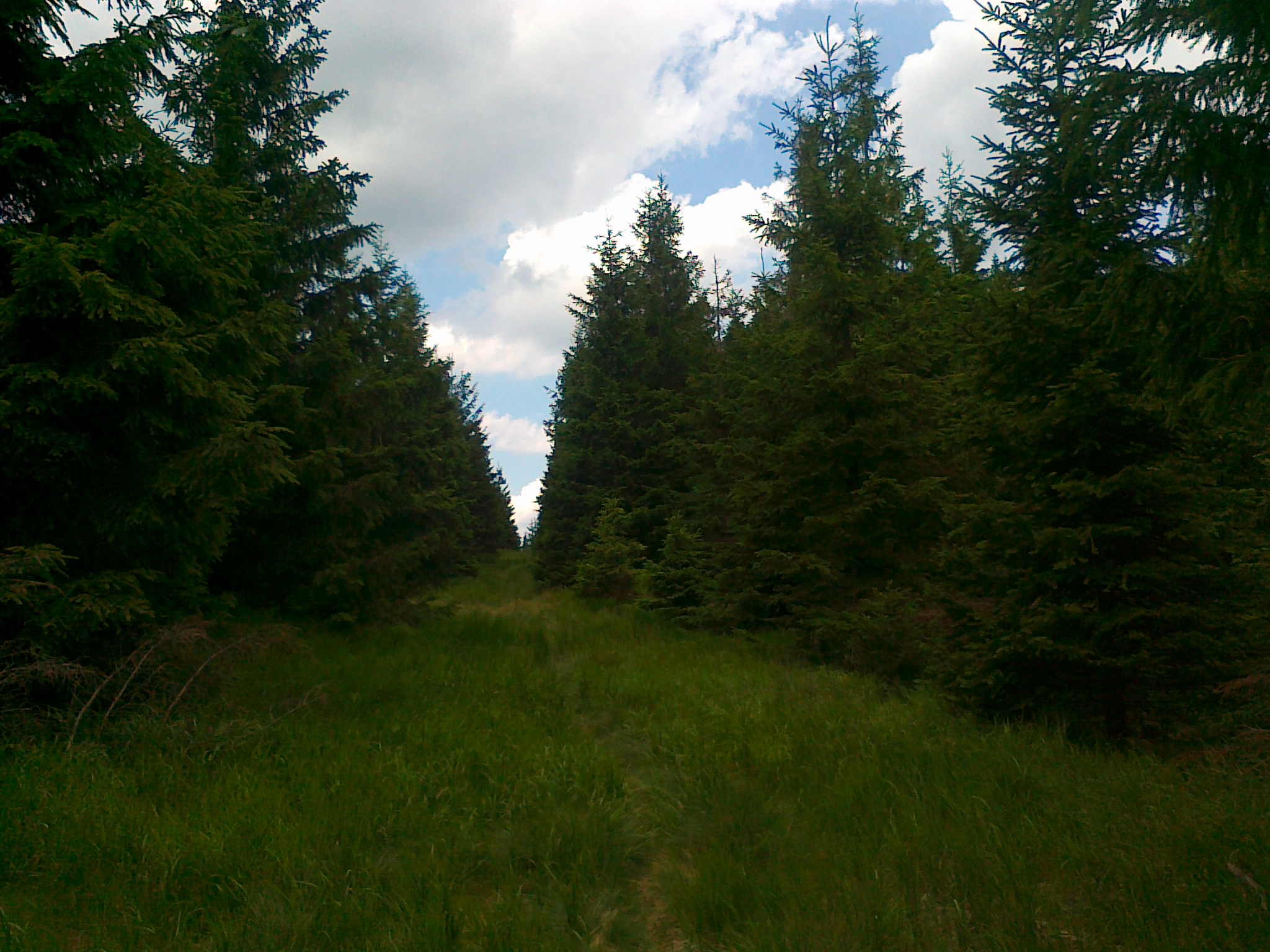 Ścieżka główna na górze Lyra - 1103 m